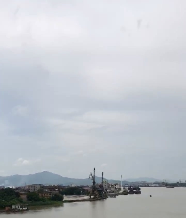 中文（香港）: 位於潭江水面的公益鐵橋橋墩遺跡